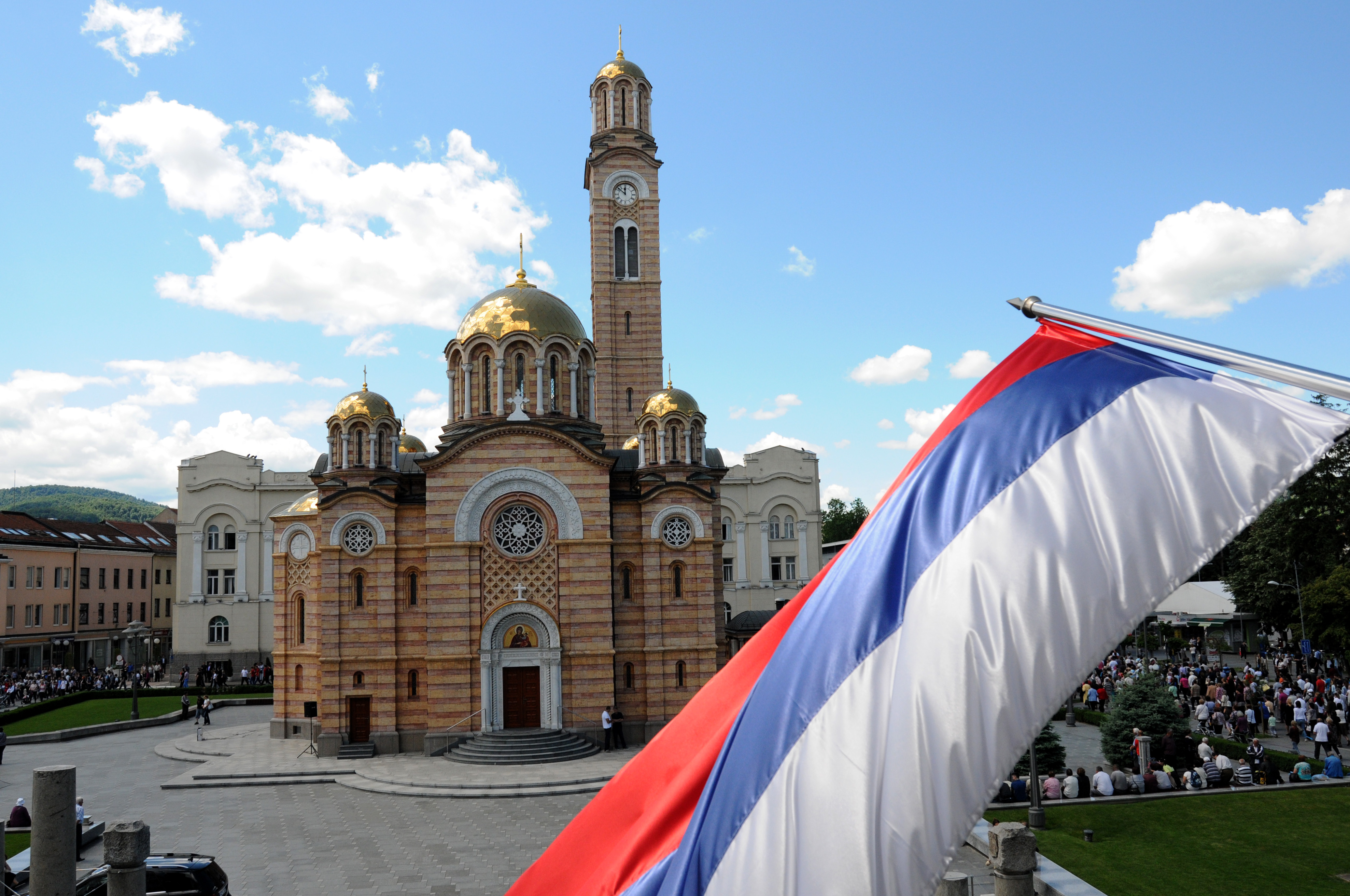 hram hrista spasitelja banja luka